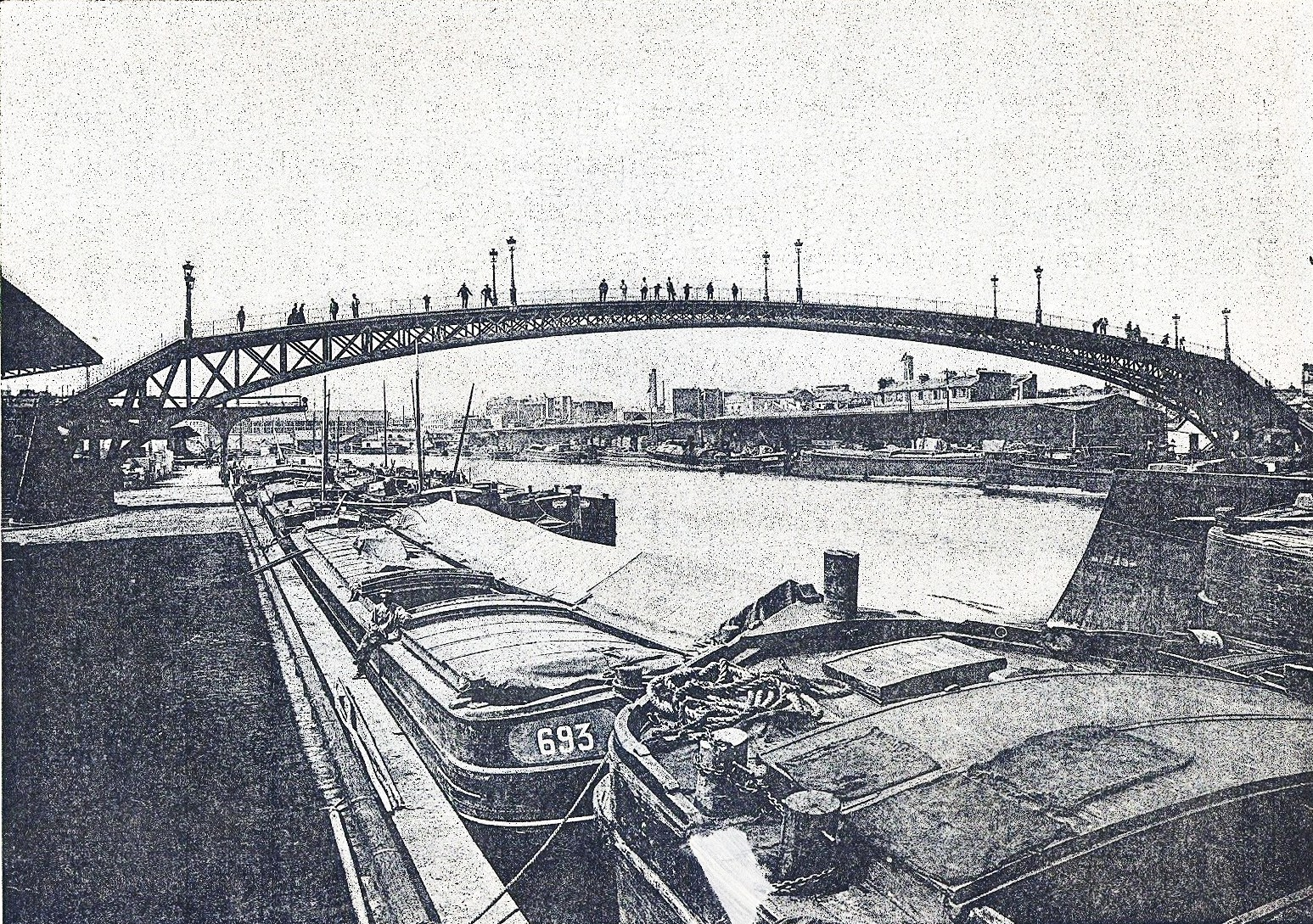 Passerelle de la Moselle à Paris, construction Armand Moisant